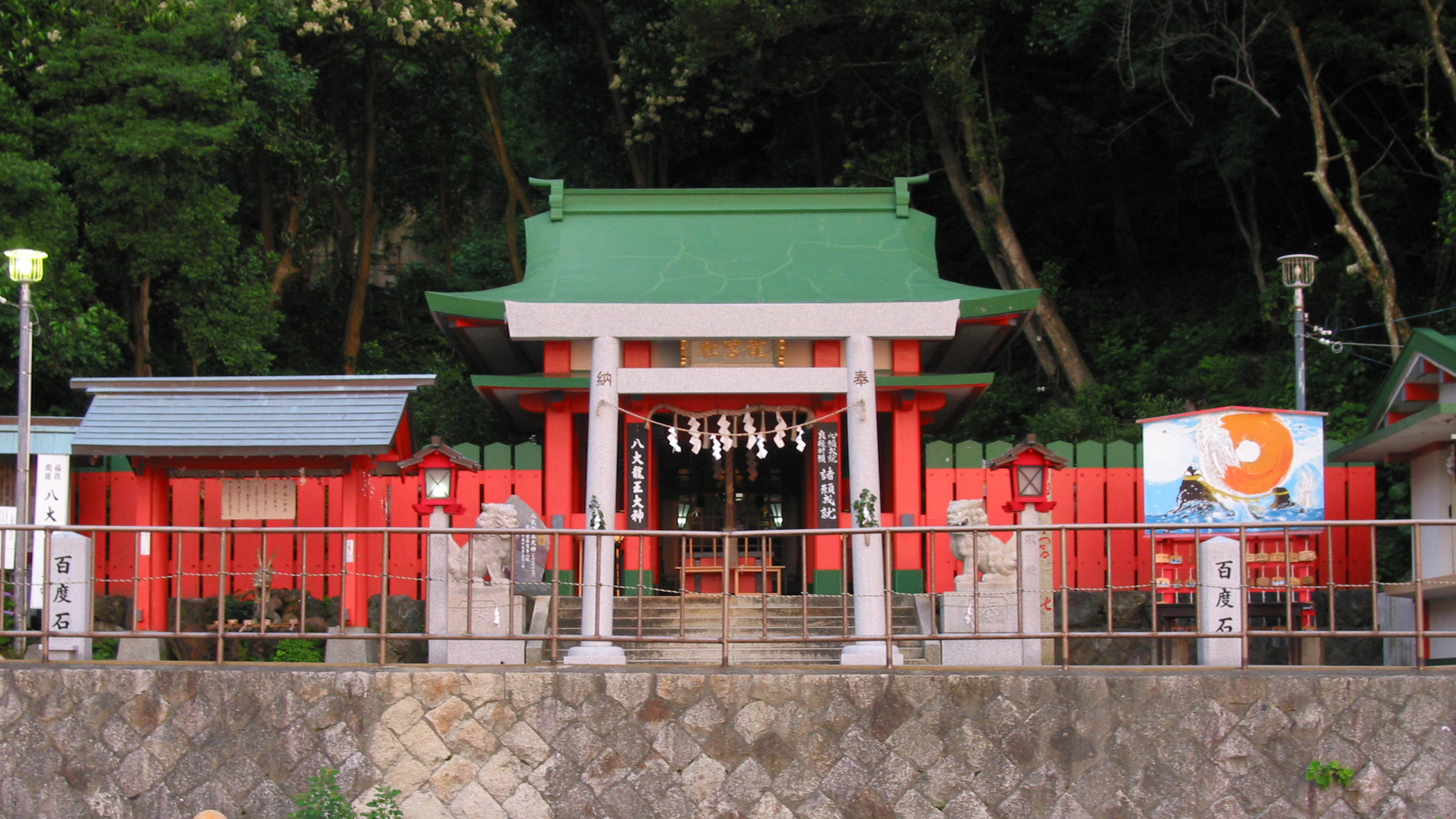 Ryūgūsha of Futami Okitama Shrine. 二見興玉神社の境内社である龍宮社。 三重県伊勢市二見町江で撮影